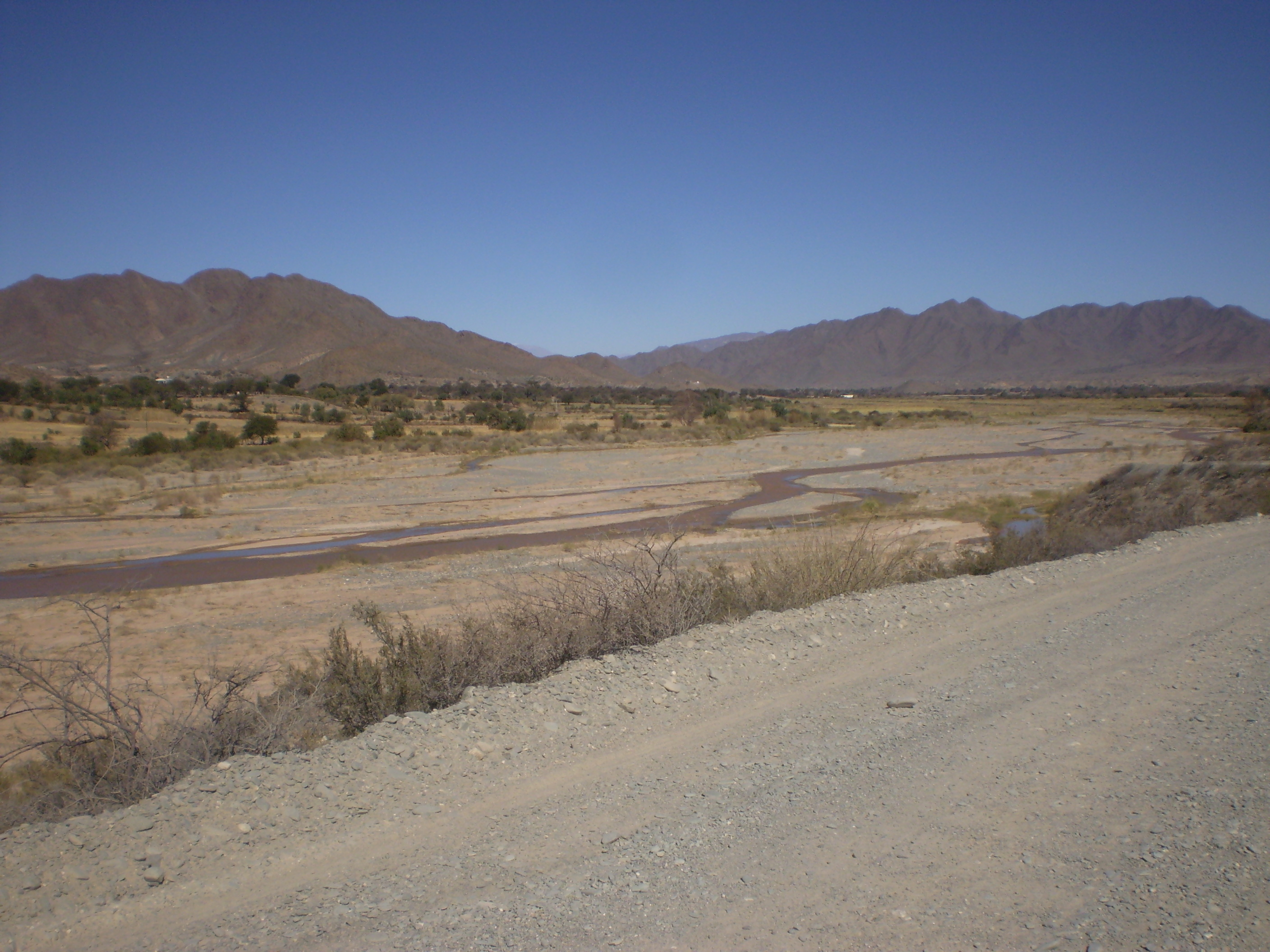 El río Calchaqui (caudal de invierno) a la vera de la ruta 40 cerca de la localidad de Seclantas, Salta, Argentina